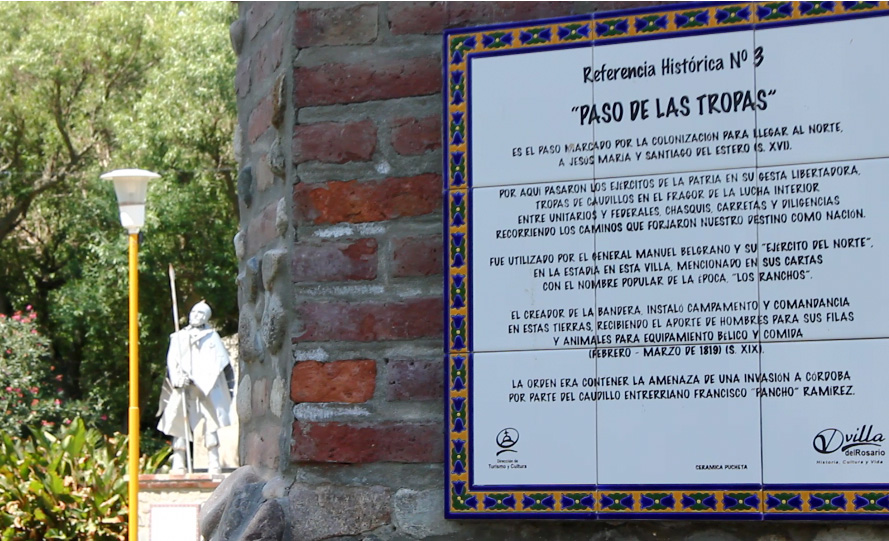 Placa explicativa de los acontecimientos historicos que tuvieron lugar en el Paso de las Tropas